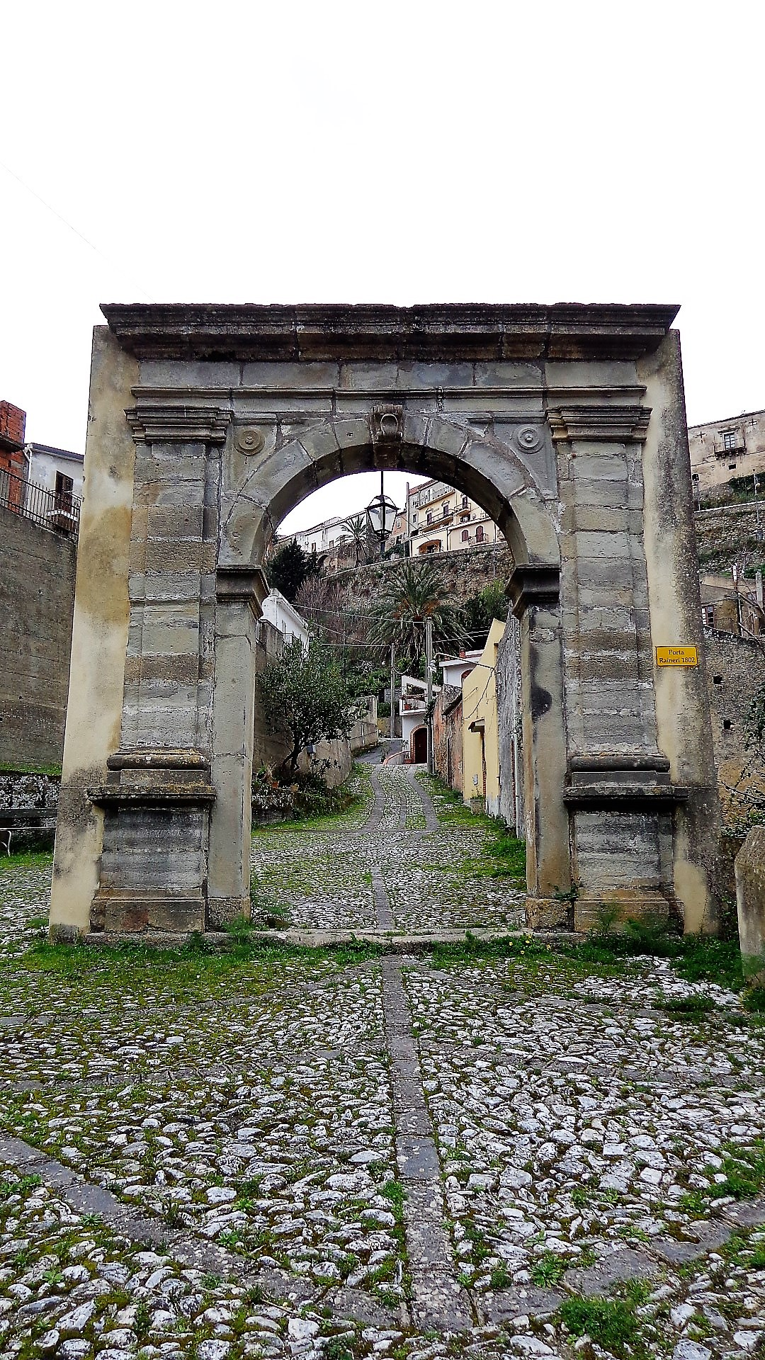 Portale Ranieri